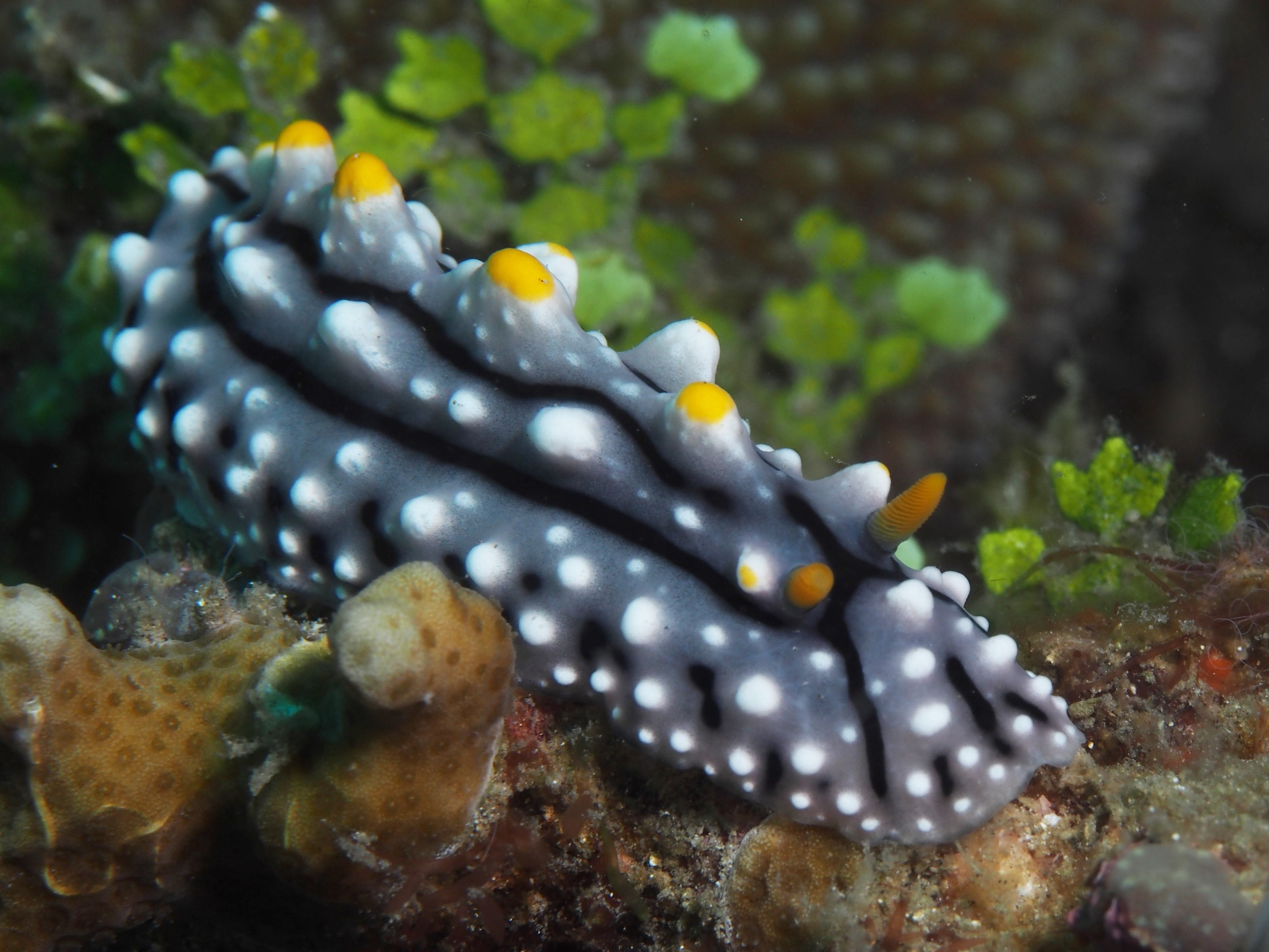 Lembeh, Indonesia - Phyllidia elegans